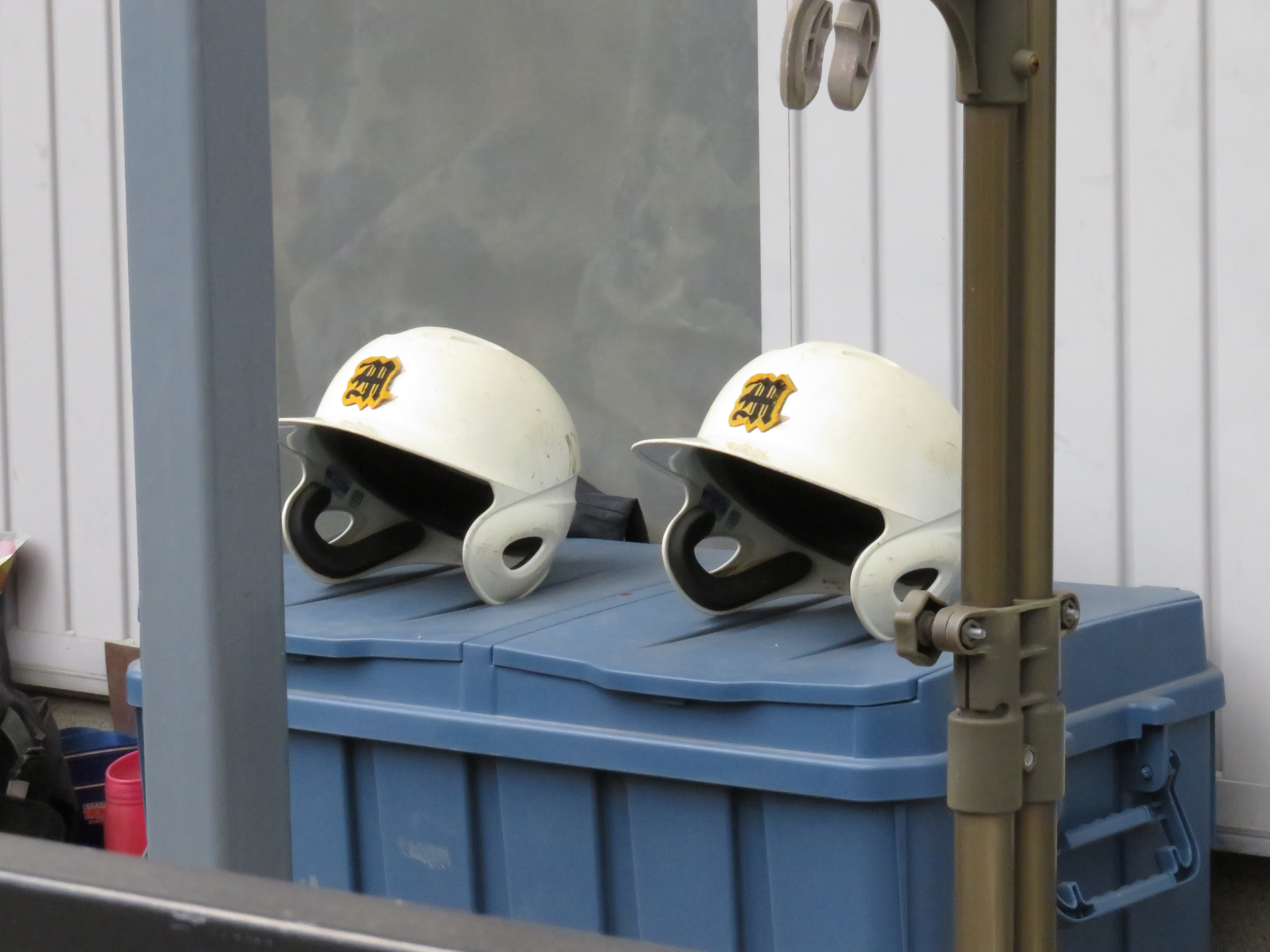 兄弟